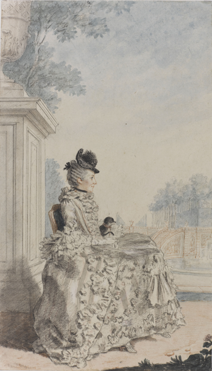 Portrait de Louise-Anne-Madeleine de Vernon, épouse de Philippe-Henri, marquis de Ségur, Maréchal de France et Ministre de la Guerre